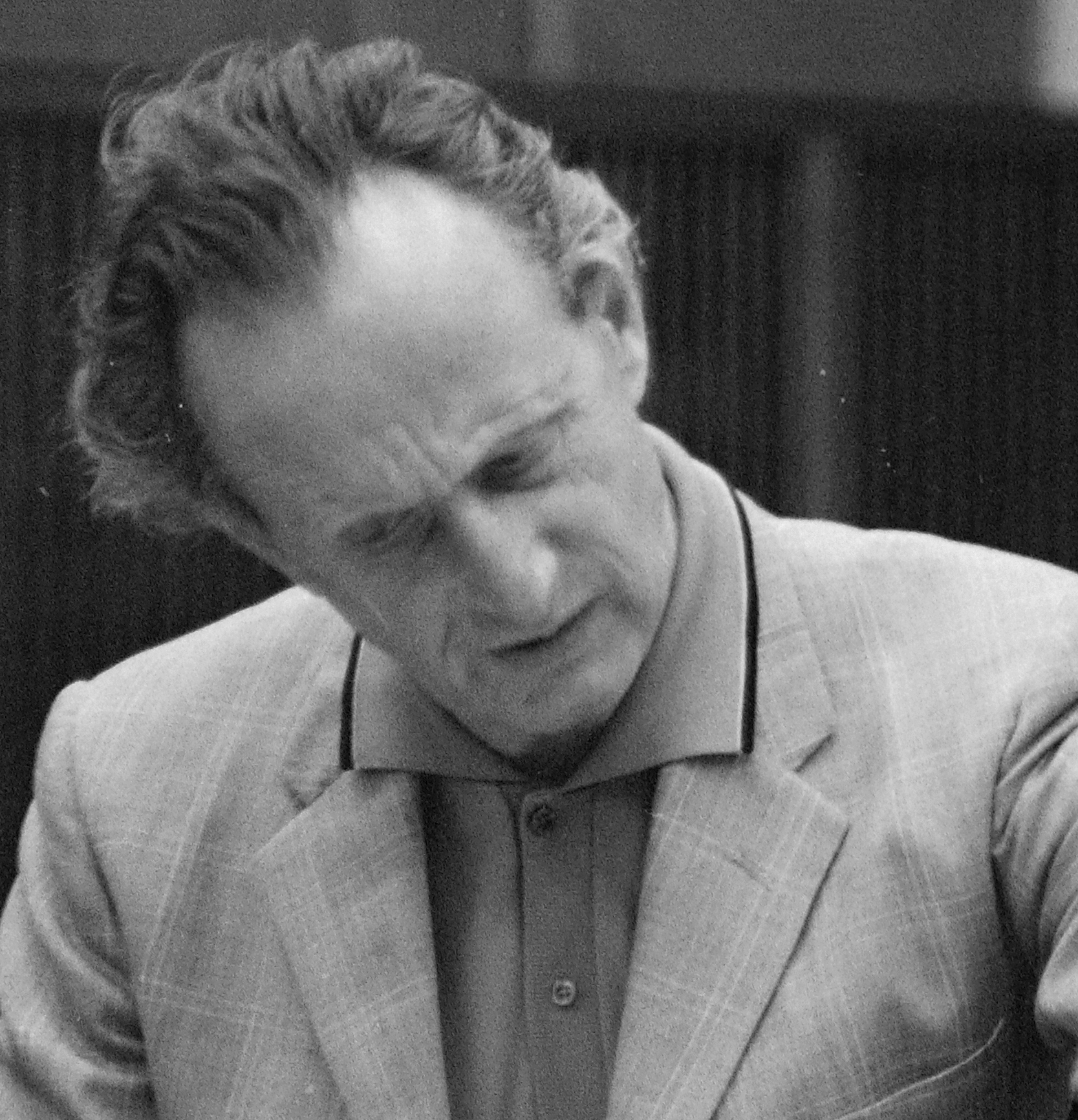 Ránki György magyar zeneszerző.